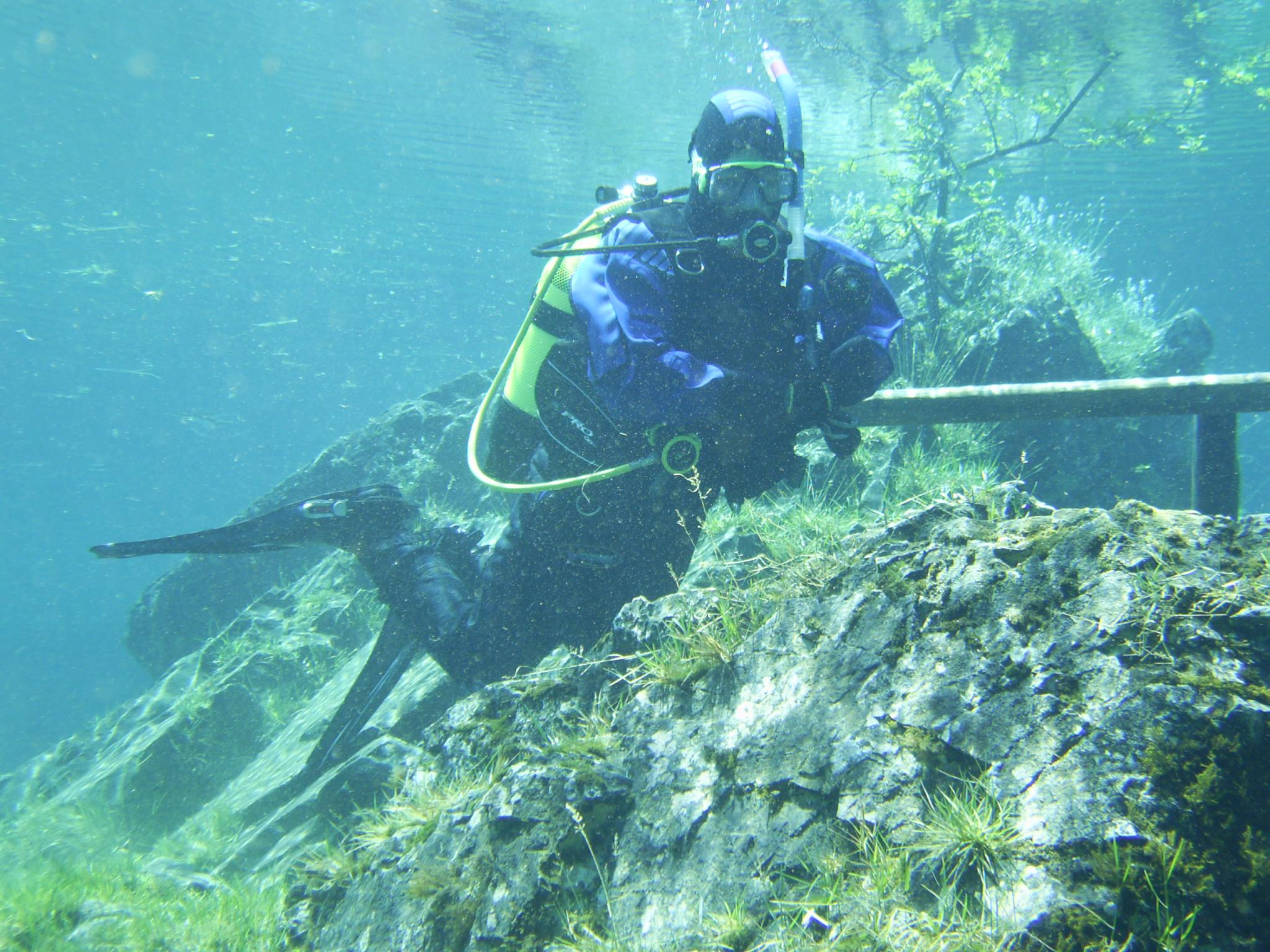 DIGITAL CAMERA 2006 - Grüner See